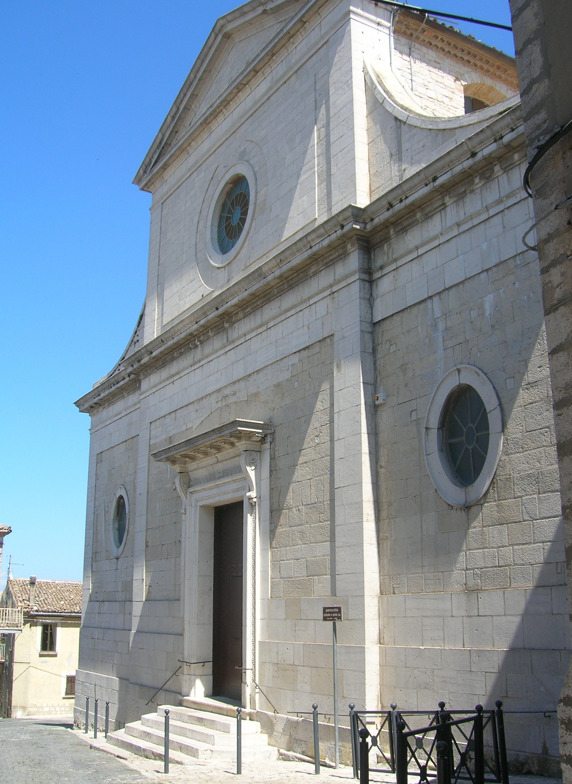 Parrocchia S. Nicola e Maria SS., Forenza (PZ)